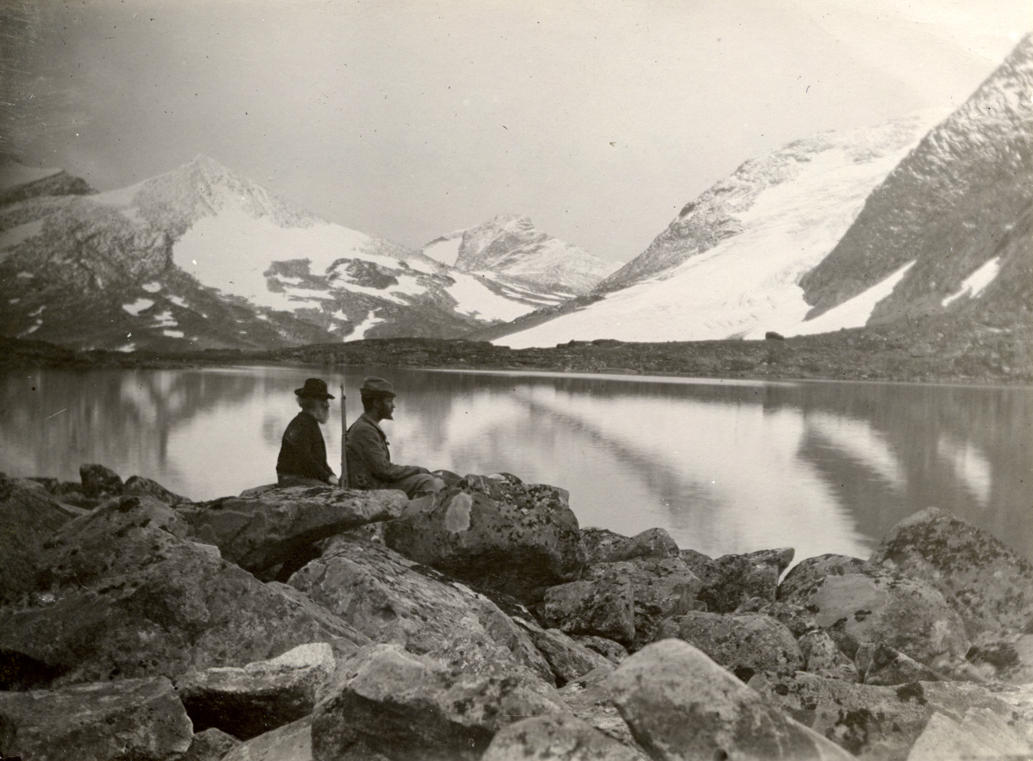 Øvre Høgvagltjønn, med følgende topper fra venstre: Skarddalstinden (delvis), Skarddalseggje, Rauddalseggi (i bakgrunnen), Austre Høgvagltind (delvis). Man ser også en arm av Høgvaglbreen.